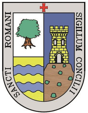 Logo ayuntamiento San Román de Cameros